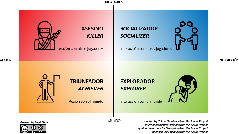 Existen 4 tipos de jugadores según R. Bartle: los asesinos, los socializadores, los exploradores y los triunfadores.